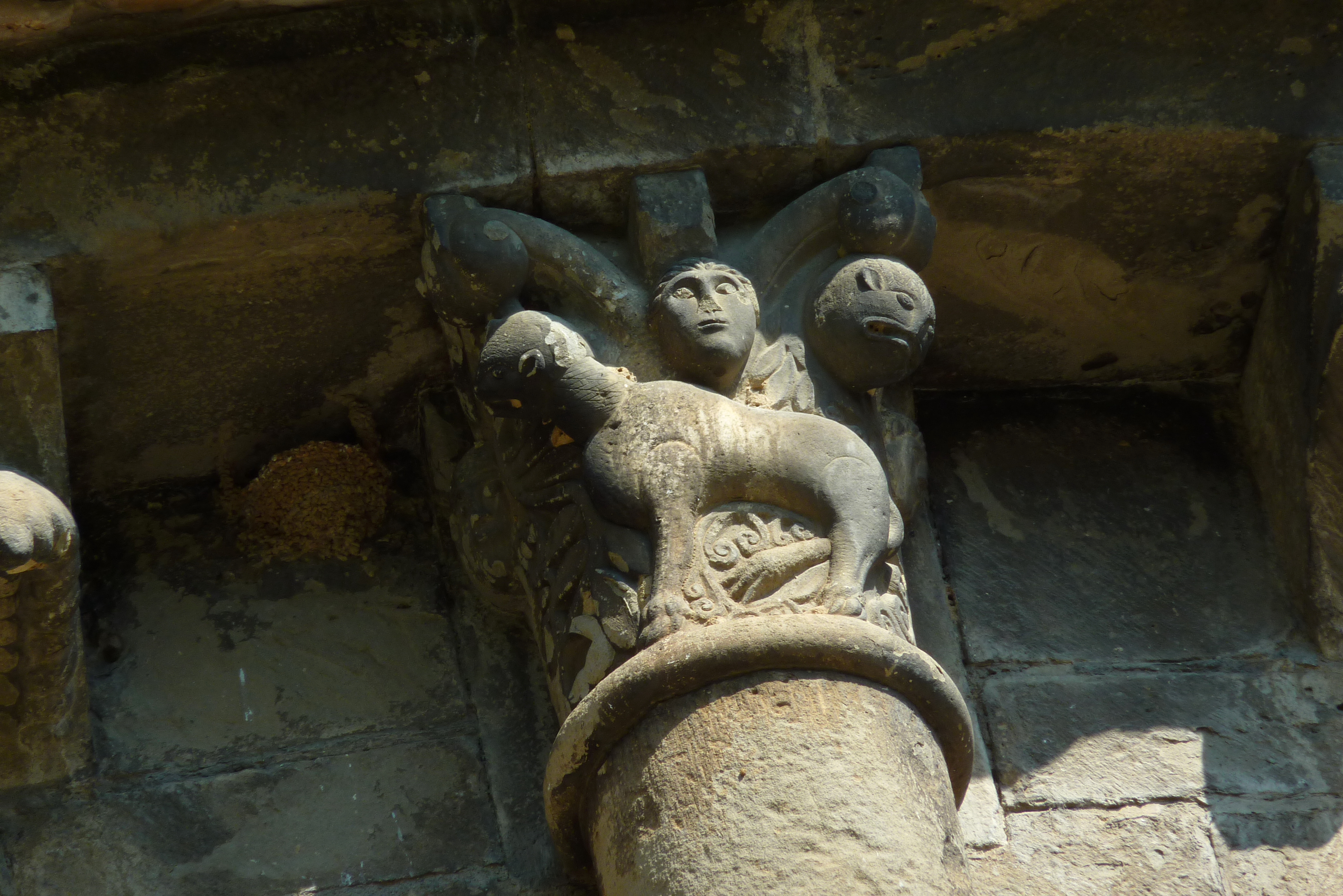 Pfarrkirche und ehemalige Klosterkirche Santa María in Santa Cruz de la Serós in der Provinz Huesca (Aragón/Spanien), Kapitell der Apsis